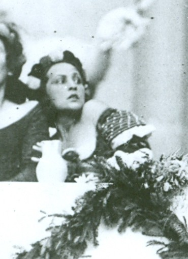 Salzburger Festspiele 1920 – Jedermann: Dagny Servaes, Alexander Moissi, Luis Rainer, Tischgesellschaft